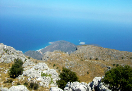 Πανοραμική θέα απο την κορυφή του όρους Καλλιμάνη